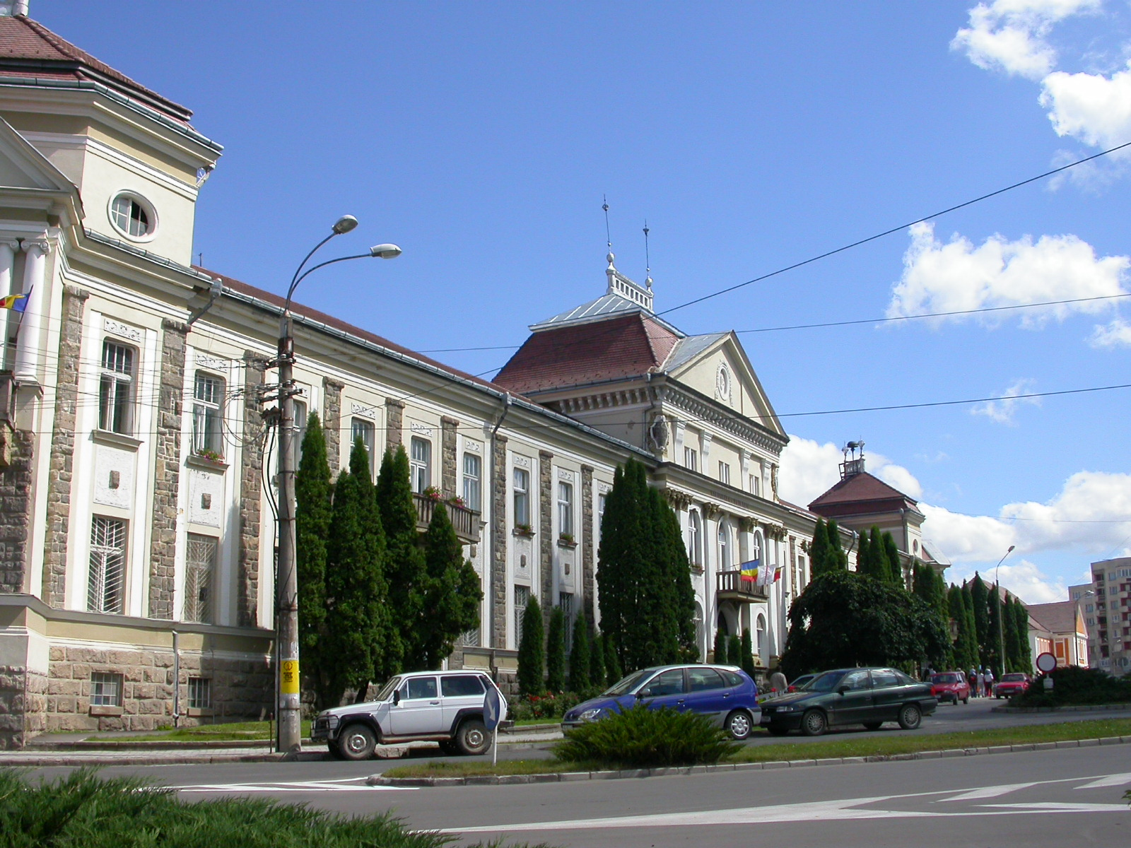 Primărie, fostul sediu al Comitatului Ciuc, 1884-1888, ext. 1914